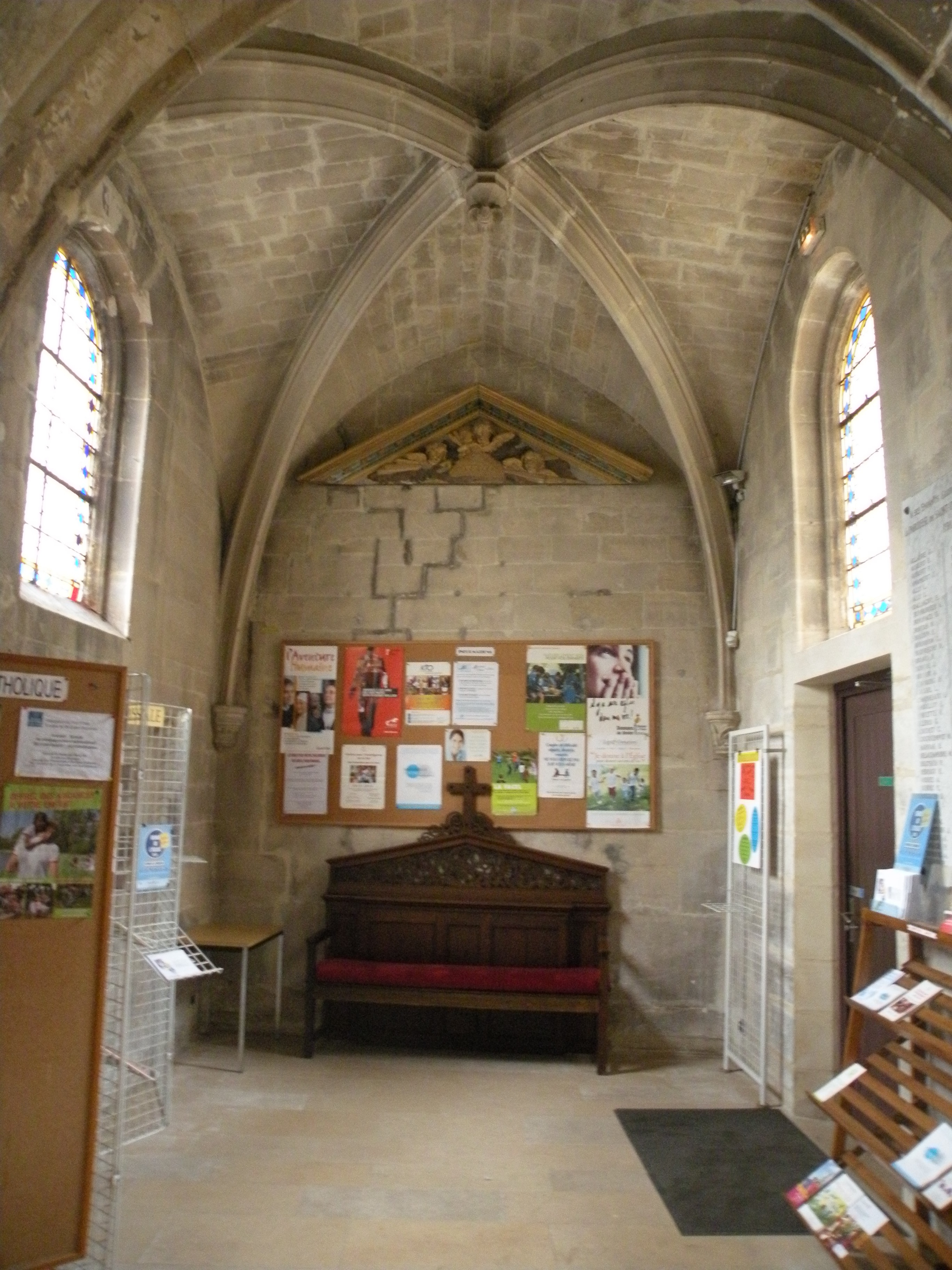 Église Saint-Ouen de Saint-Ouen-l'Aumône